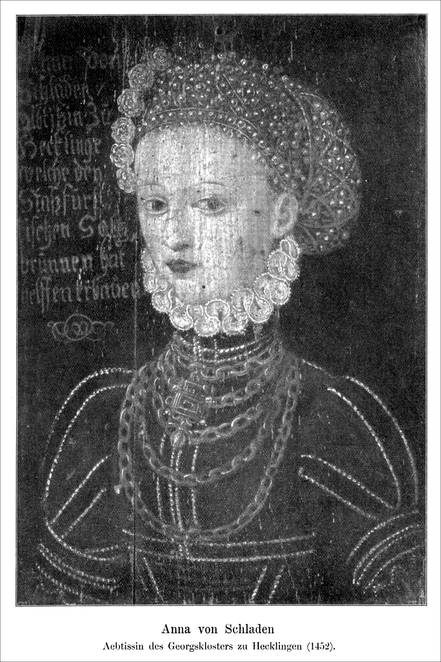 Bildnis der Anna von Schladen, Äbtissin des Georgsklosters zu Hecklingen